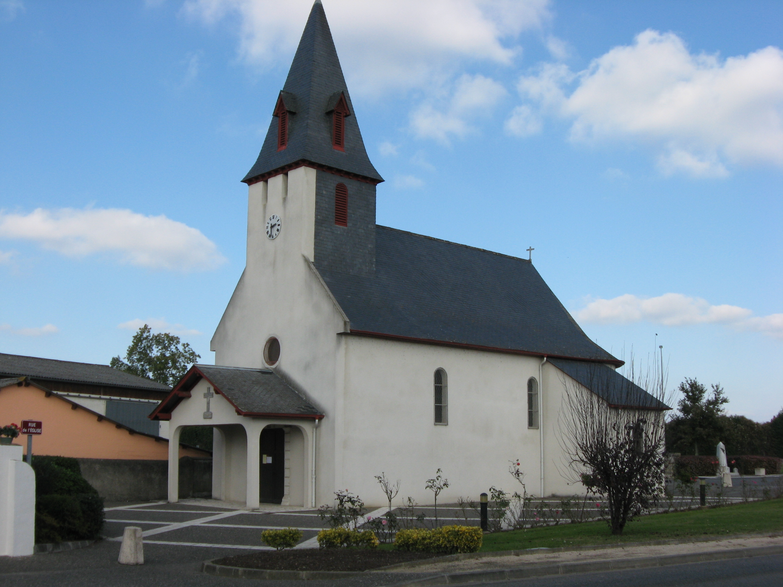 Eglise de Noguères (Pyrénées Atlantiques) Pyrénées).